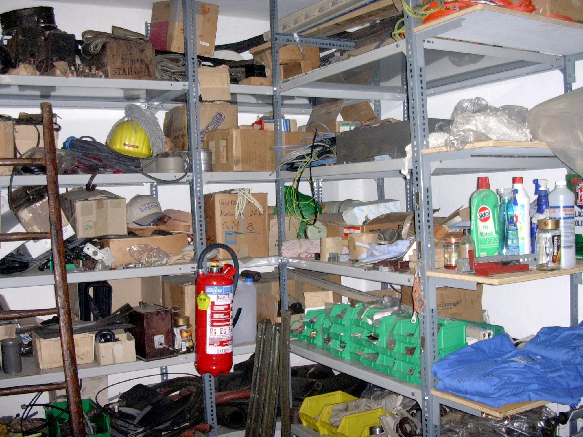 Regal 2